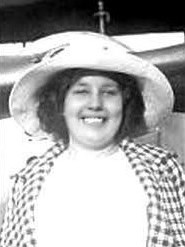 Božena Laglerová, česká pěvkyně a pilotka